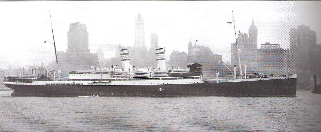 אוניית הנוסעים א/ק ירושלים של חברת צים בנמל ניו יורק